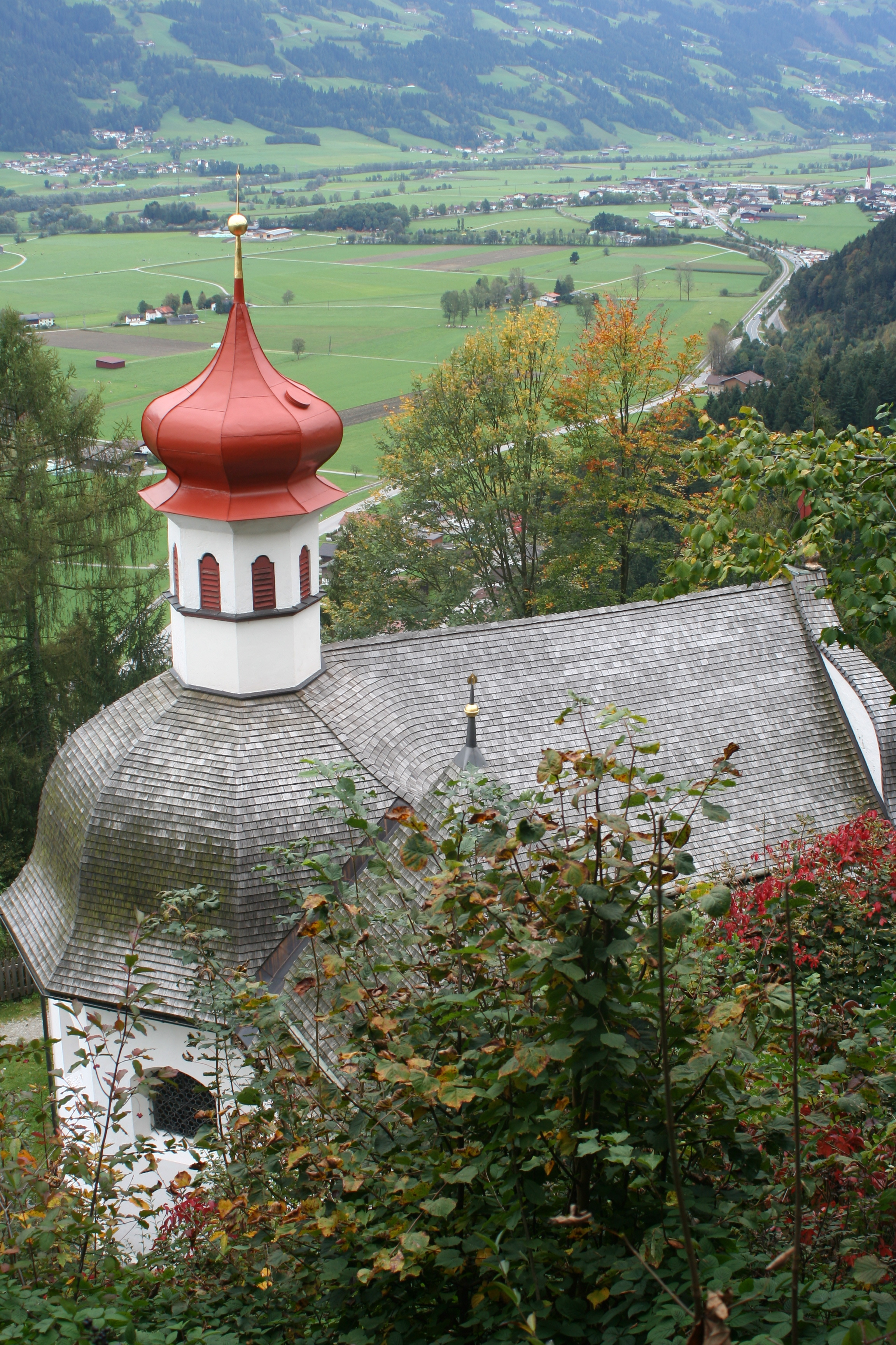 Die Kirche von Maria Brettfall mit Blick in das vordere Zillertal, Tirol, Österreich